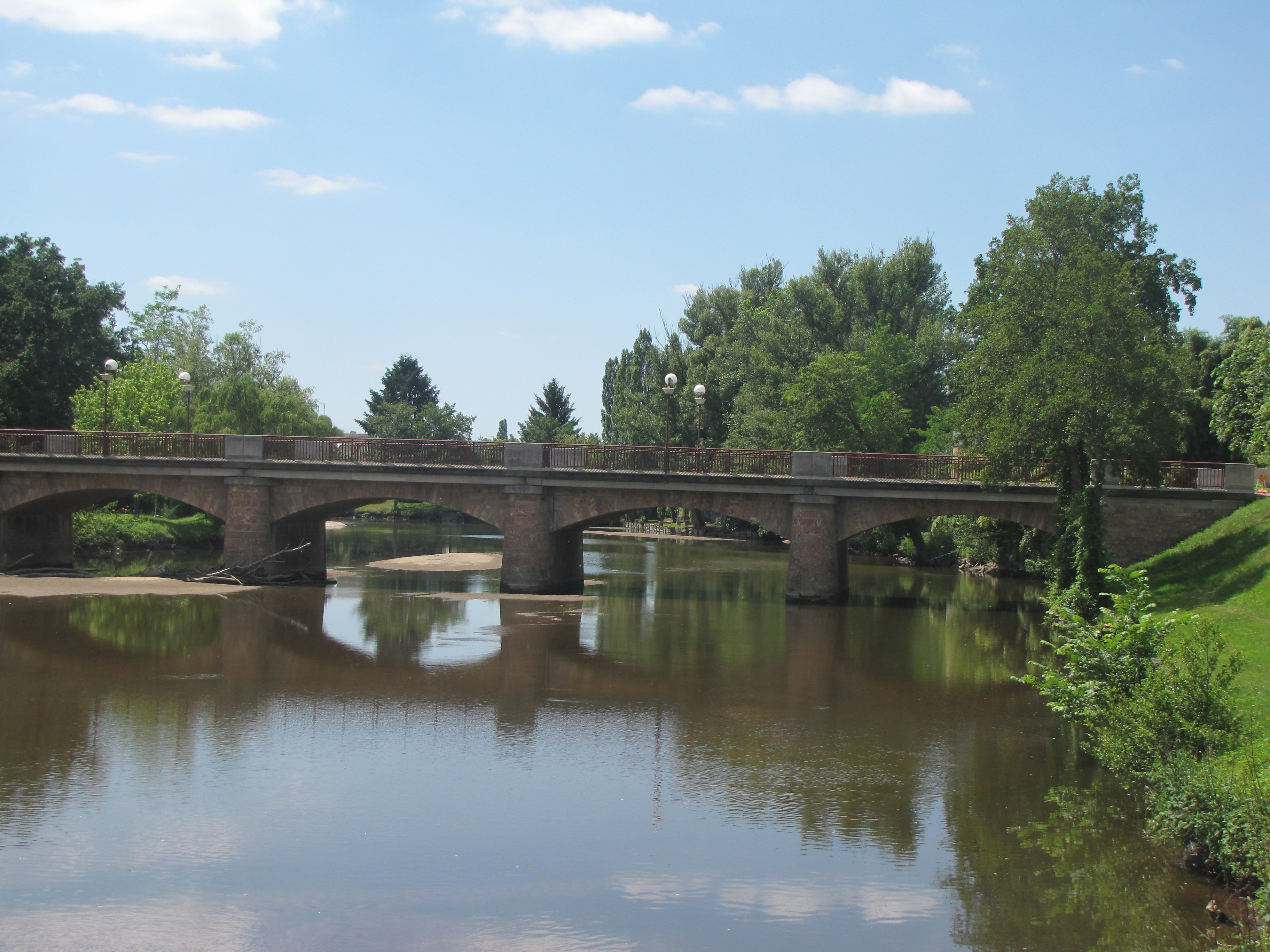 Pont sur l'Aumance - Entrée du village de Meaulne (03360)